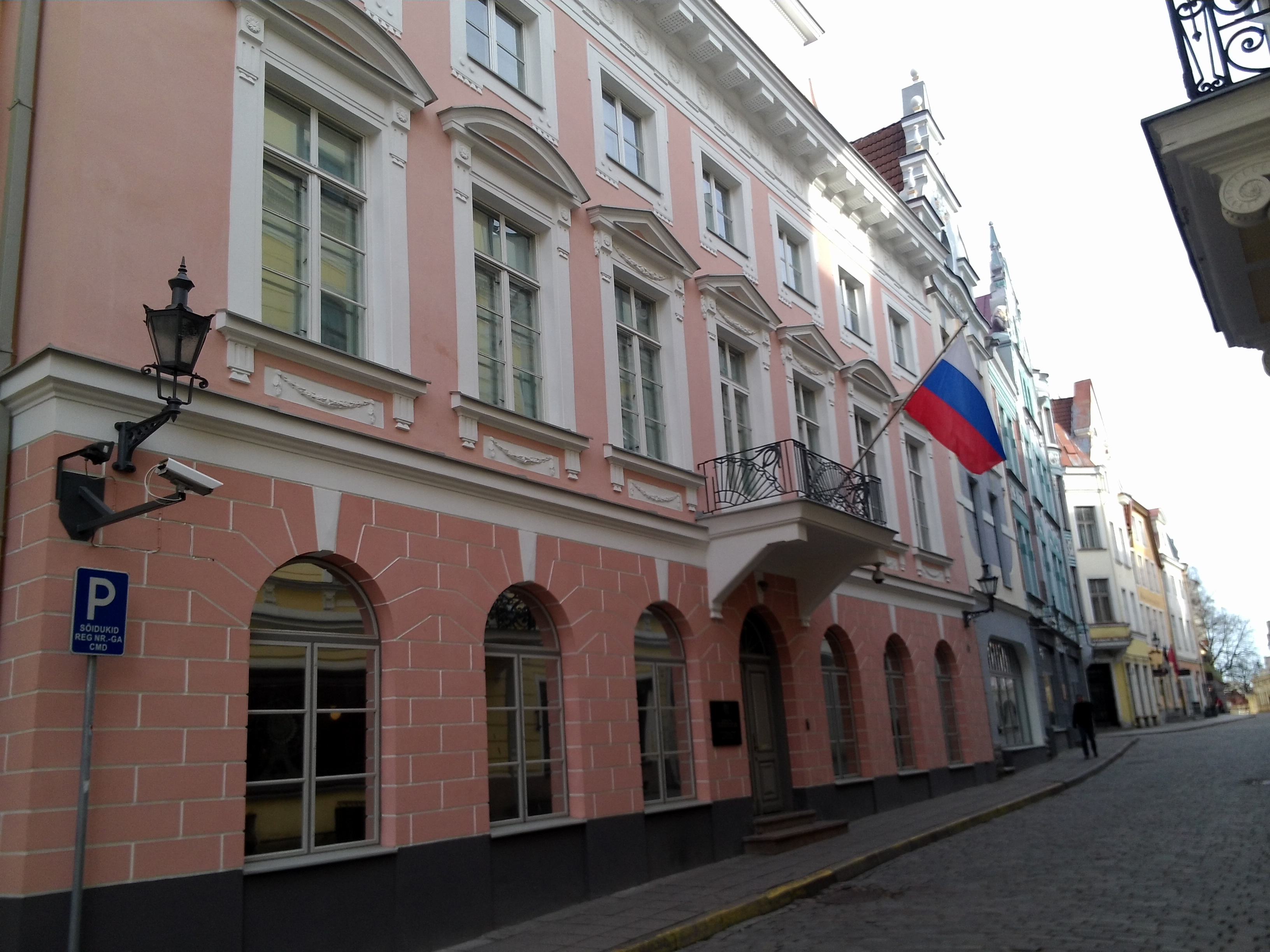 Elamu Pikk tn 19, 18.-20.saj.